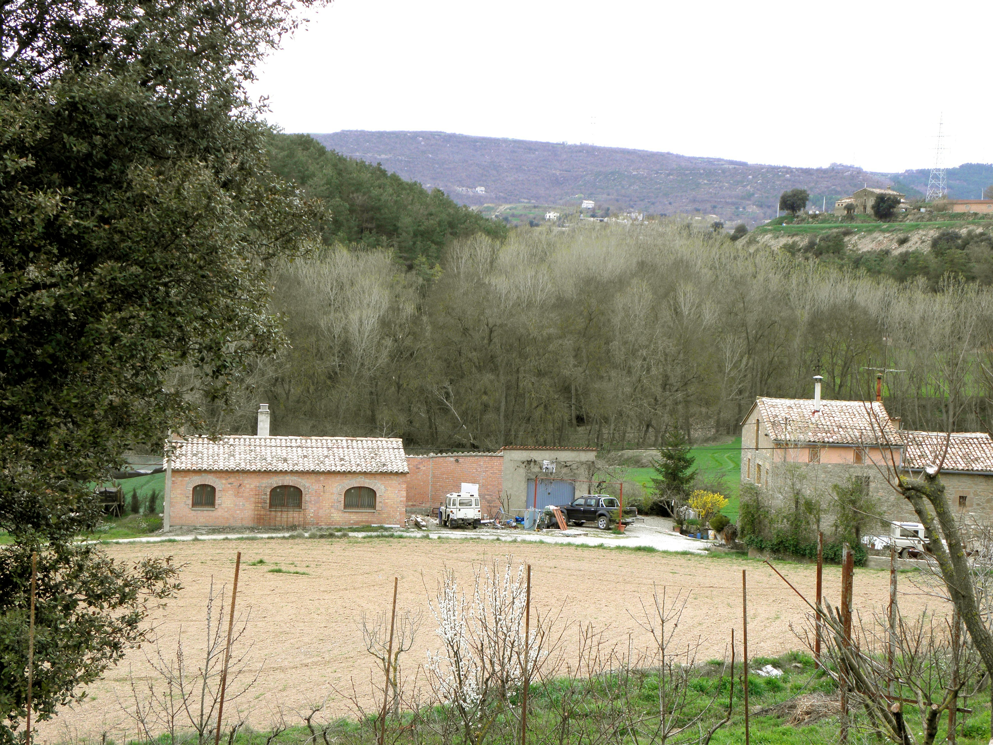 La vall del Barranc de Cor-de-Roure, a la frontera entre els termes municipals d'Olius i Solsona (Solsonès) en el punt de confluència amb el riu Negre, que transcorre de dreta a esquerra pel darrera de la Masia que hi ha en primer terme (Cal Violí). Dalt la carena del vessant de la dreta de la fot, Cal Xarandet.